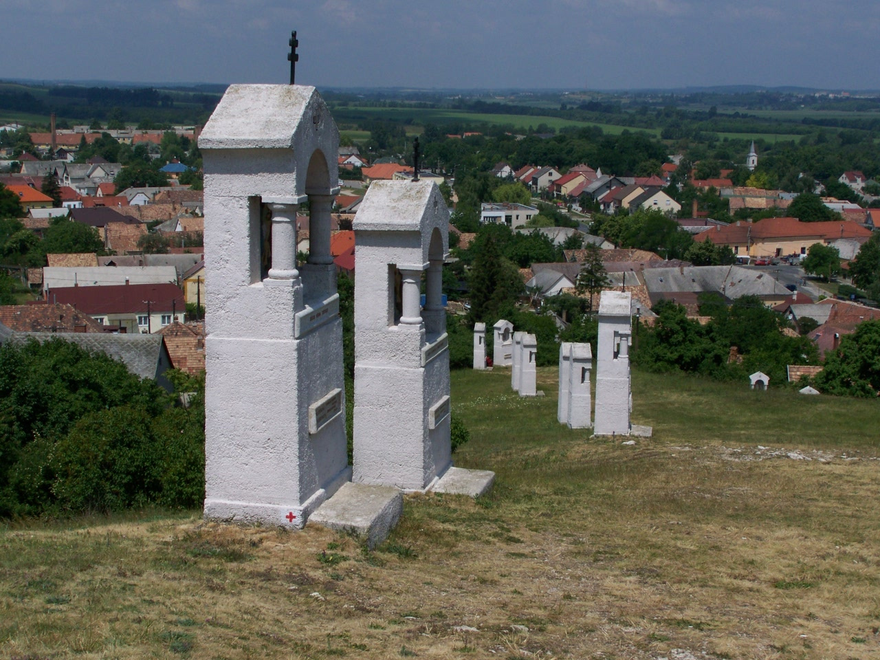 stációk (Bodajk, Kálvária u. 30.) This is a photo of a monument in Hungary, Identifier: 15036